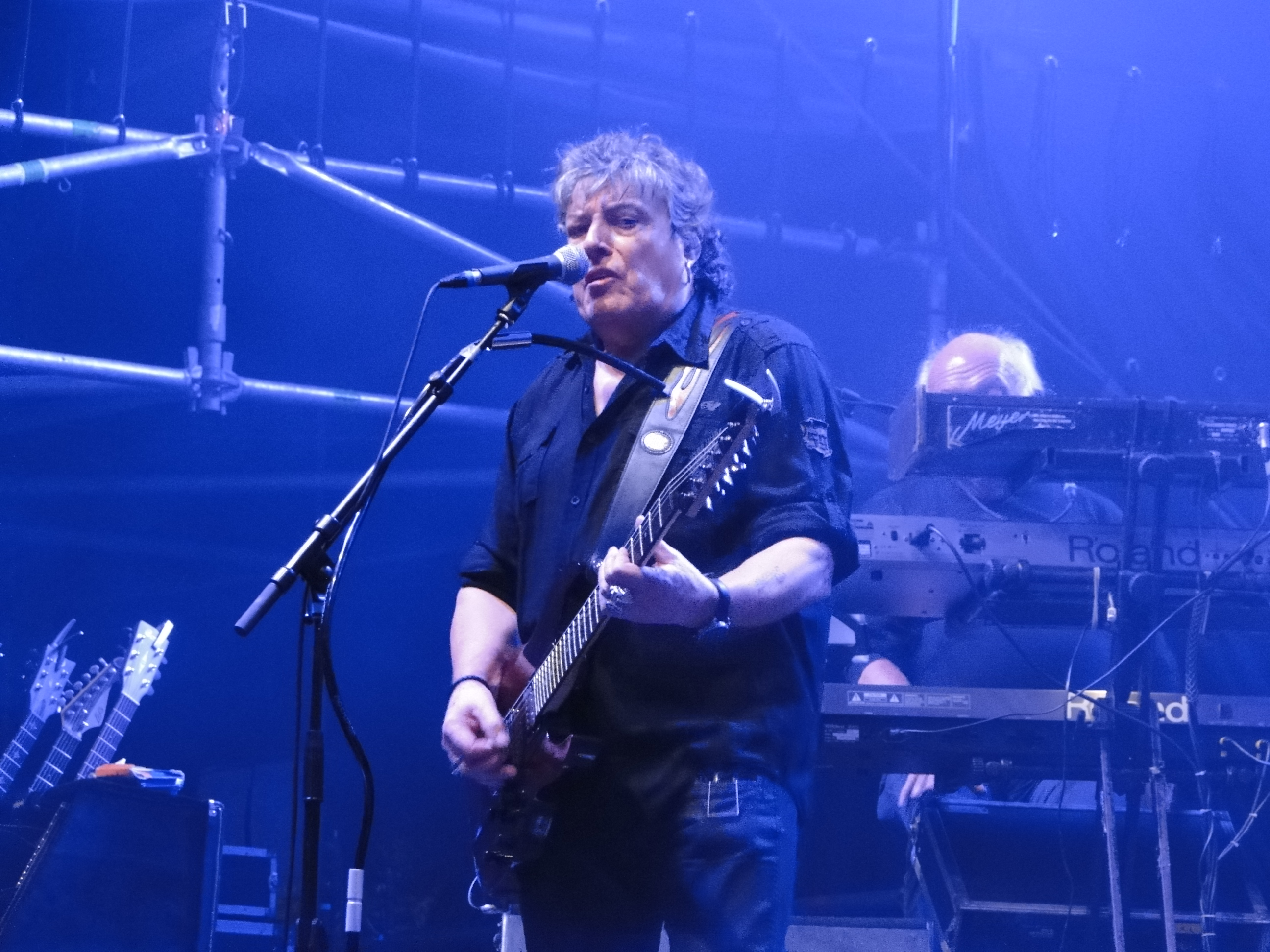 Dieter "Quaster" Hertrampf bei einem Konzert der Puhdys in Dresden 2013